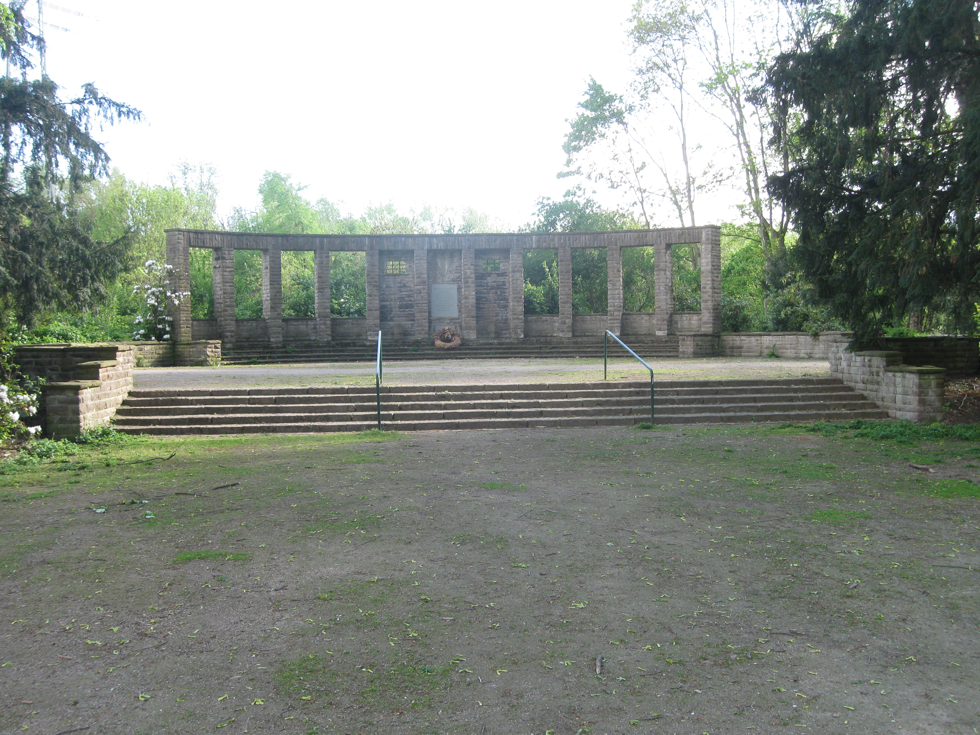 Im April 1951 auf Initiative des VVN errichtetes Mahnmal für die Opfer des Nationalsozialismus im Gelsenkirchener Stadtgarten. Unter den Fenstern der etwa 20 Meter breiten, halbkreisförmigen Anlage sind Steintafeln mit den Namen von acht NS-Konzentrationslagern angebracht. Namentlich gedacht wird an diesem Ort den kommunistischen Opfern der NS-Herrschaft aus Gelsenkirchen sowie auch einzelnen nichtkommunistischen Widerstandskämpfern (so des katholischen Vikars Heinrich König und des sozialdemokratischen Redakteurs Alfred Zingler).[1] Zu den Einzelheiten und Inschriften siehe das unter "Andere Versionen" verlinkte Detailbild.